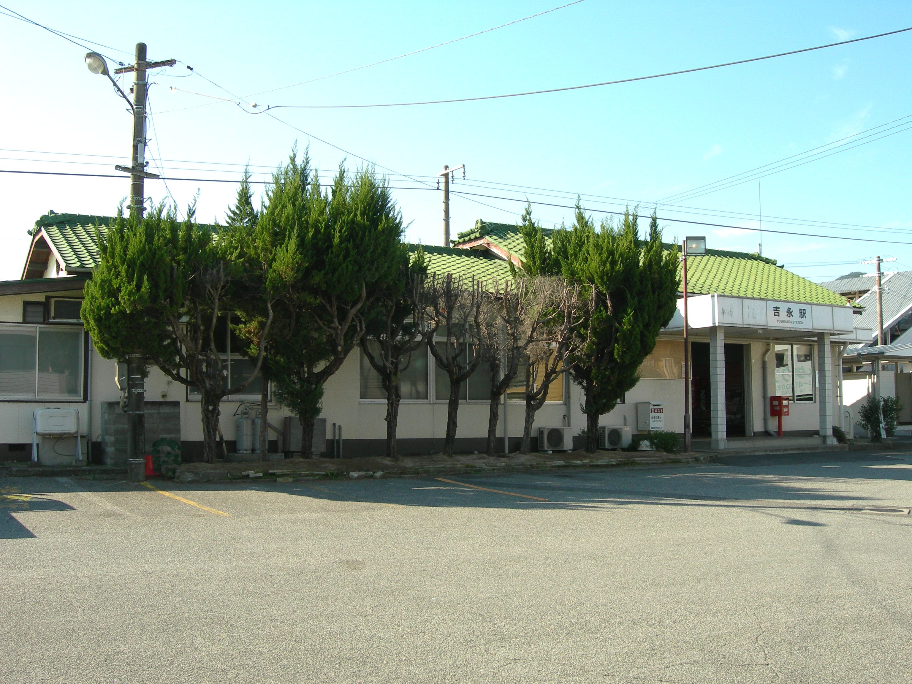 吉永駅